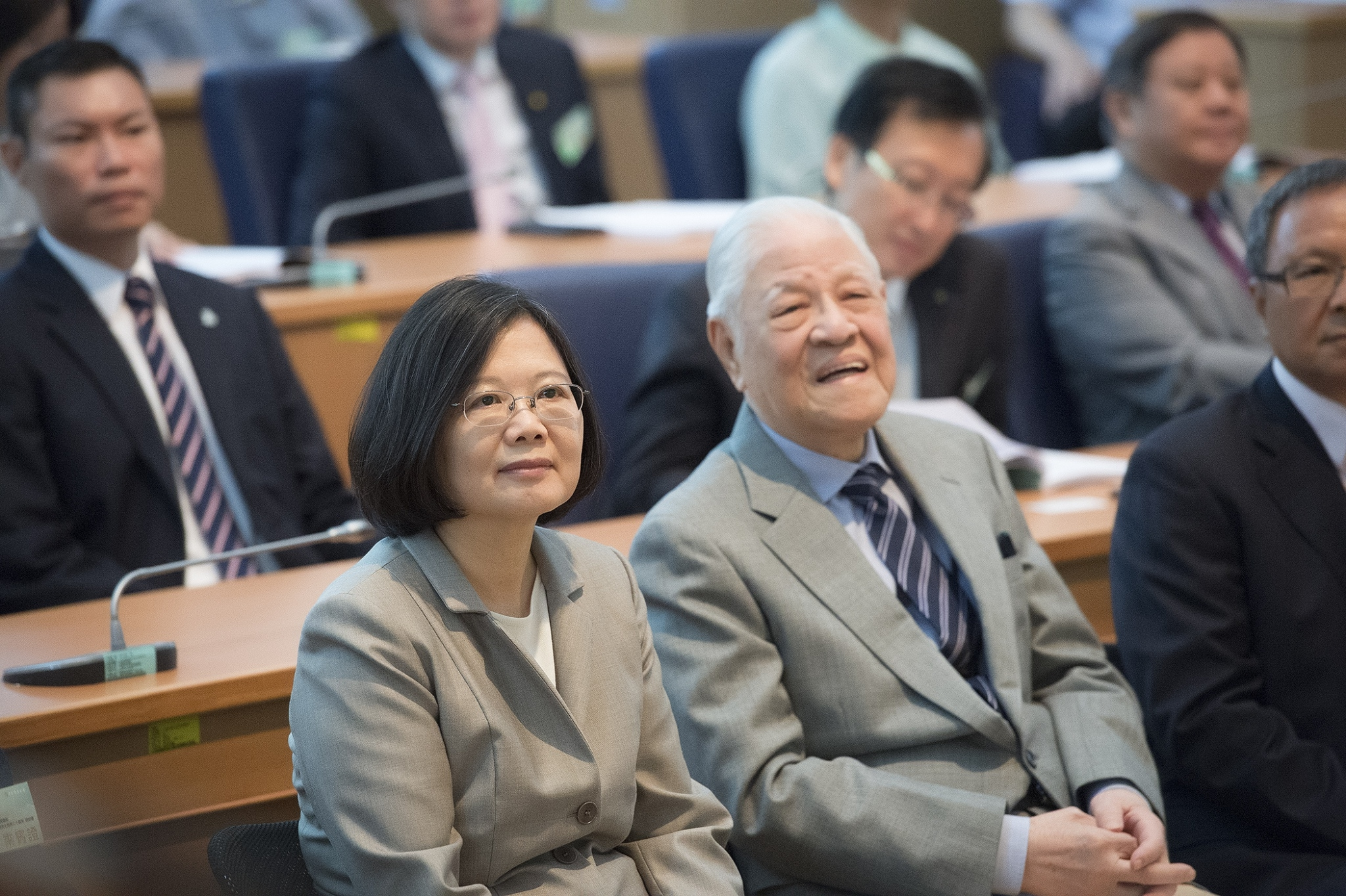 中文（台灣）: 「人民直選總統暨臺灣民主發展二十周年」研討會上，第14-15任總統蔡英文與第7-9任總統李登輝同框。